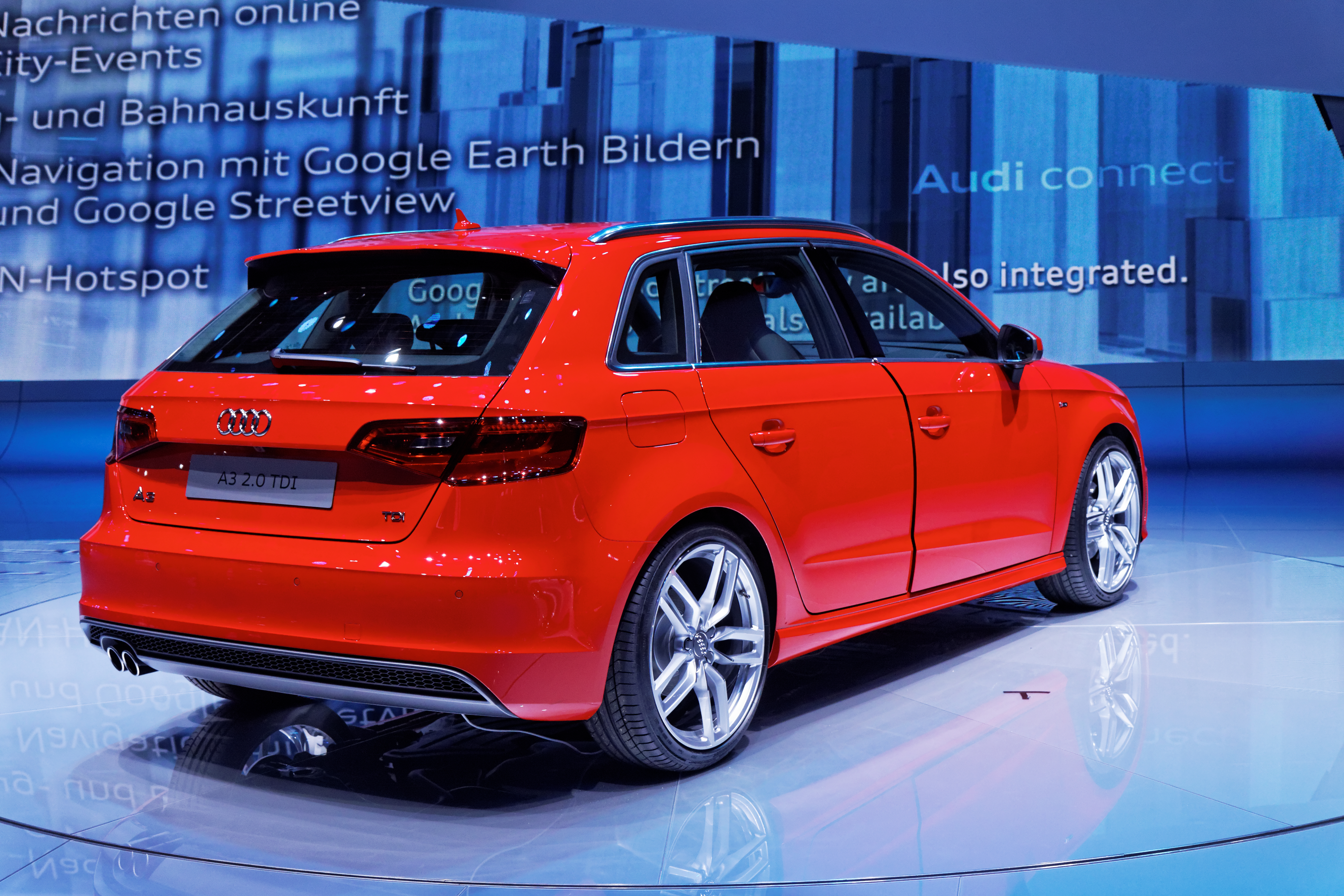 Une Audi A3 présentée lors du Mondial de l'Automobile de Paris 2012.